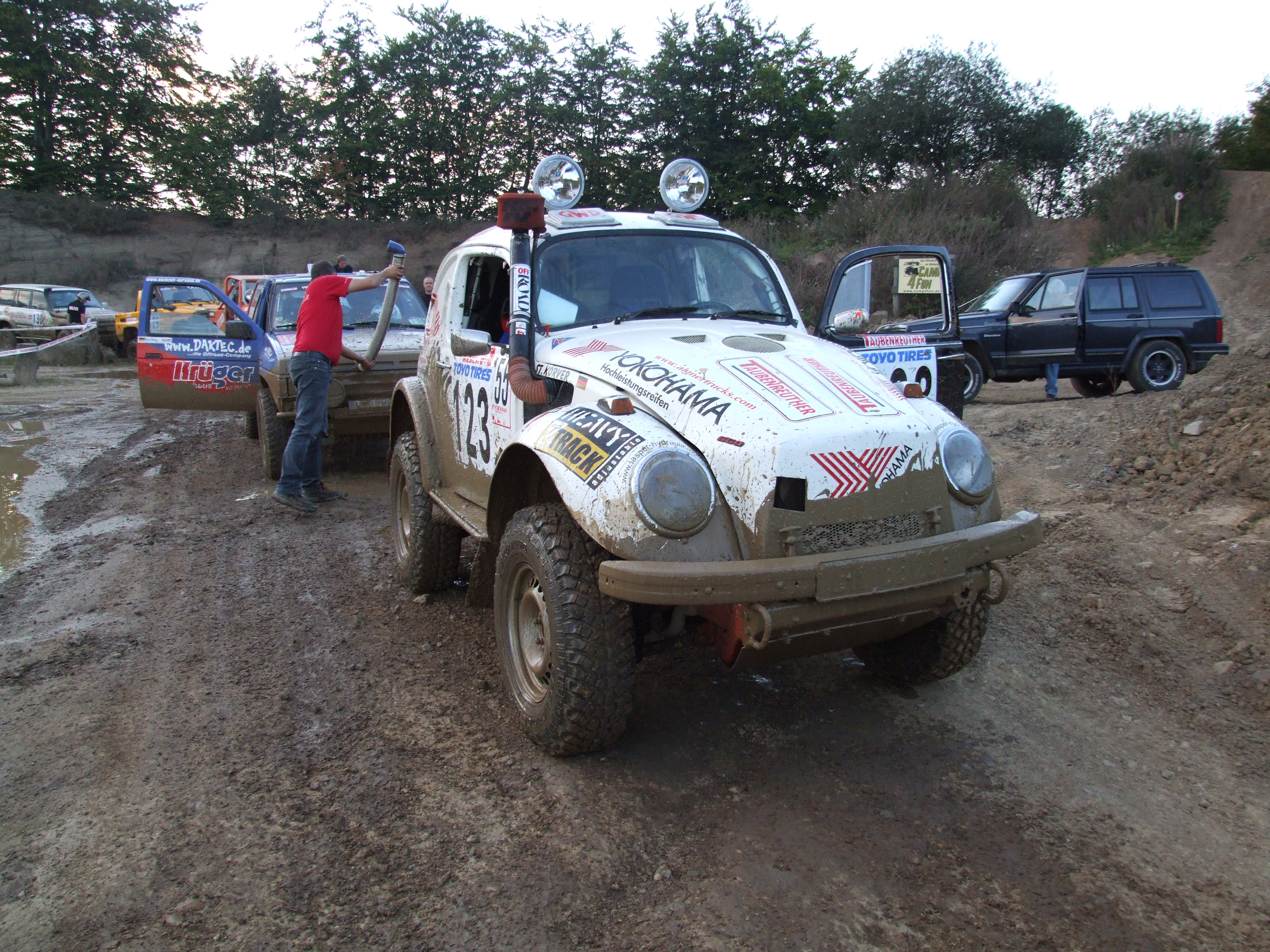 Custom Car aus drei deutschen Geländewagen: Fahrwerk des Iltis, Motor eines Mercedes G, Karosserie eines VW-Käfer ; aufgenommen während der German Off Road Masters 2007 in Drees, nähe Nürburgring in der Vulkaneifel